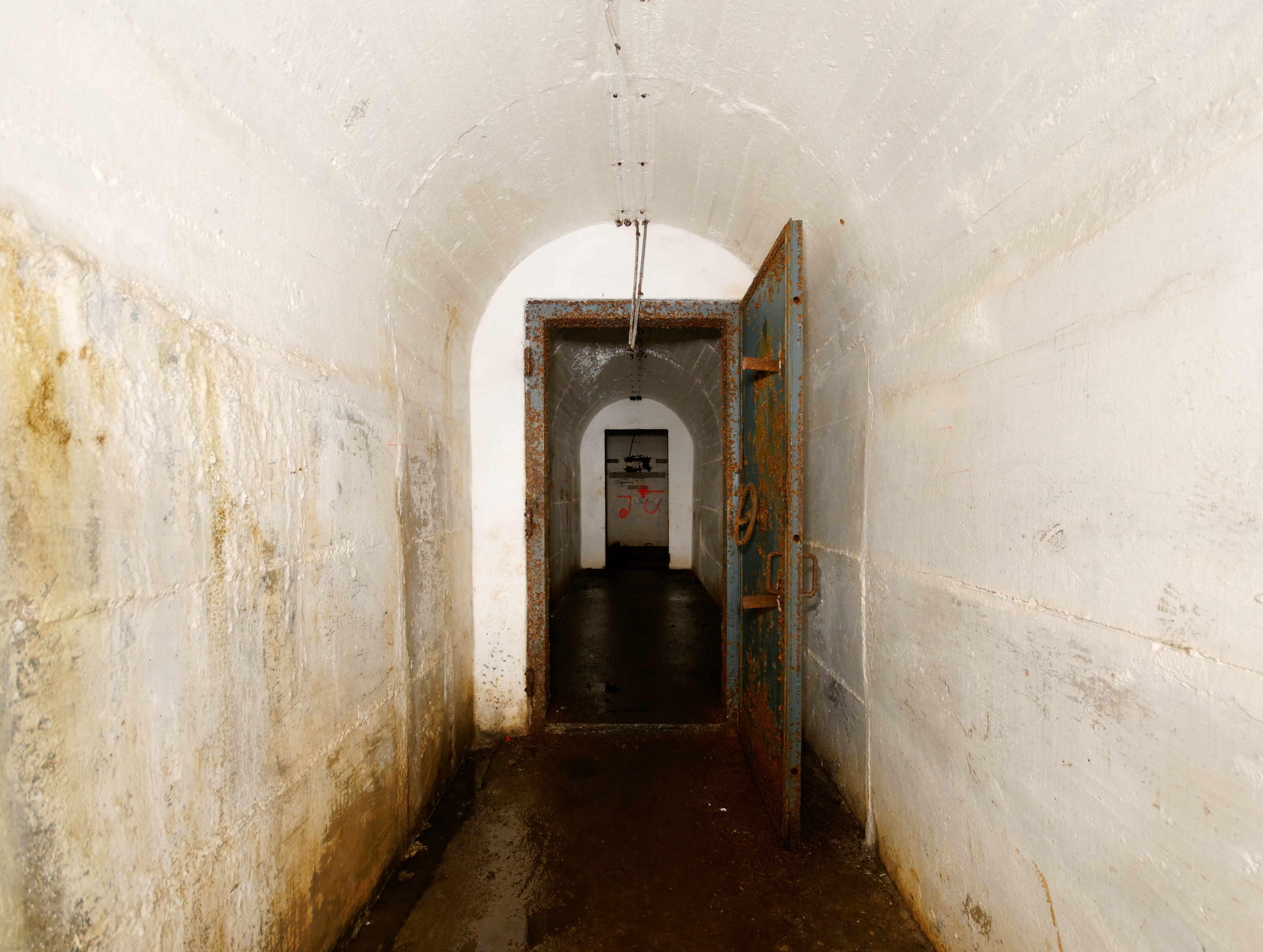 Ouvrage "G" de la D.A.T. : sas de l'entrée du personnel (lightpainting). Salbert hill fortifications. Old NATO station.